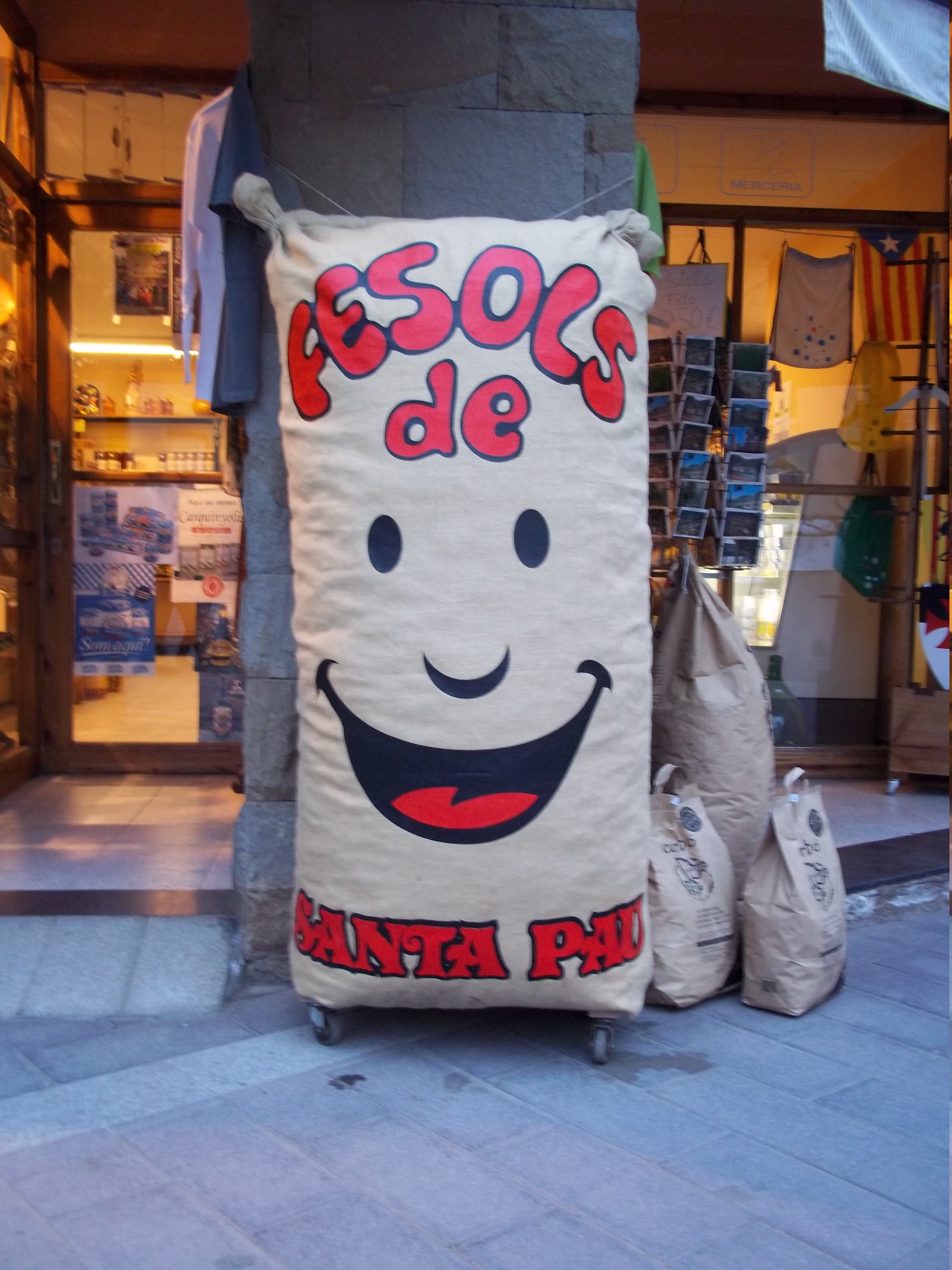 Sac publicitari al carrer amb Fesols de Santa Pau